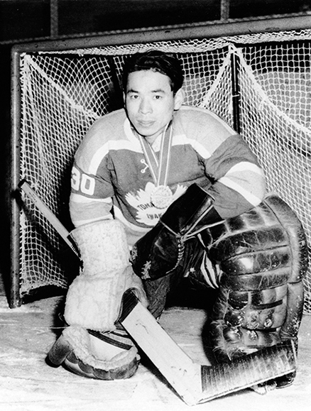 Shoichi Tomita